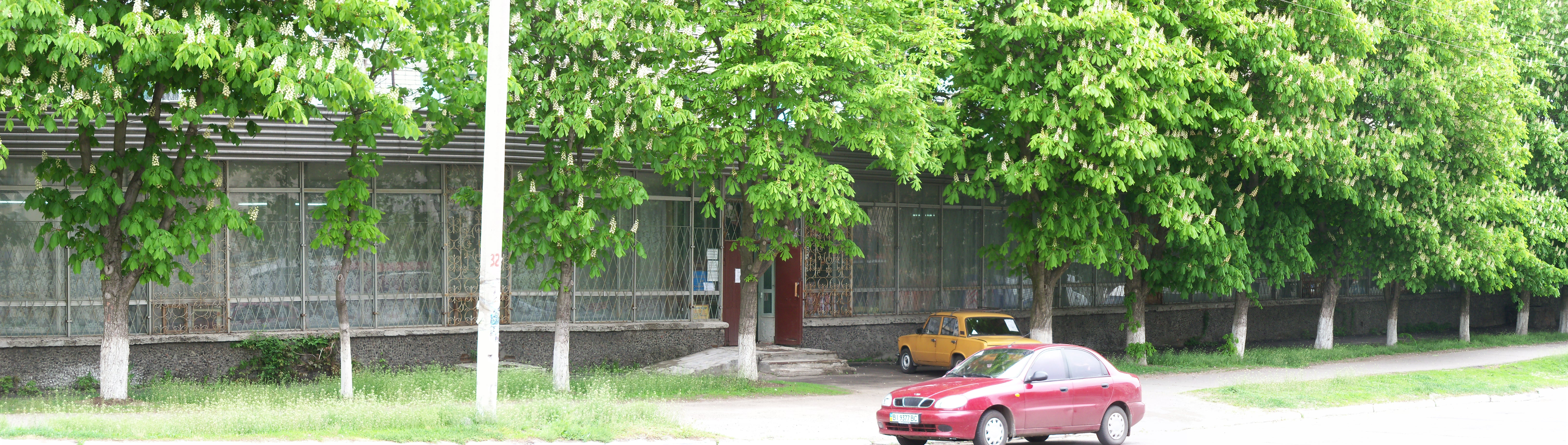 Центральна міська бібліотека (Кременчук): Центральна міська бібліотека (Кременчук) (панорама)